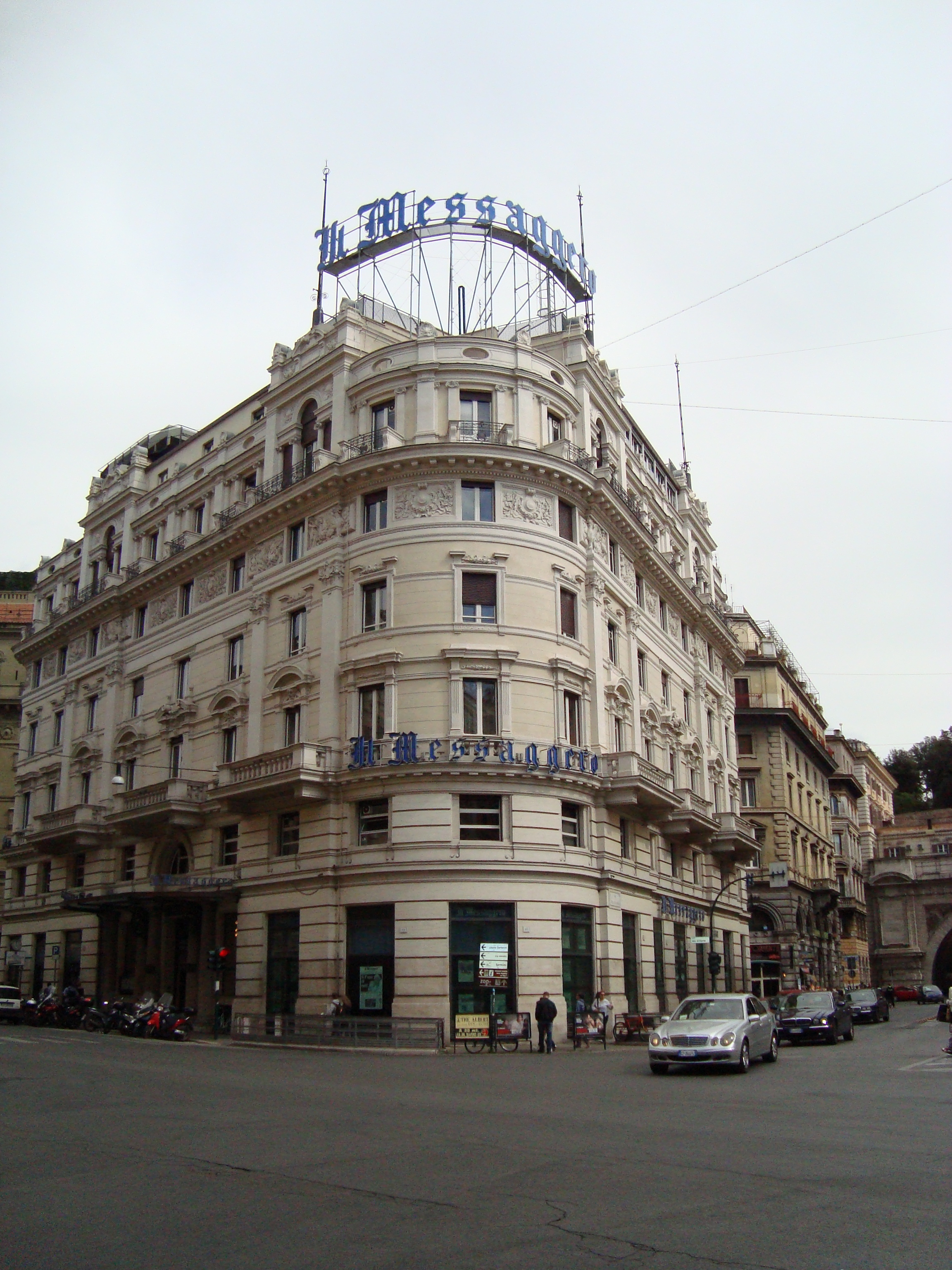 Batiment du Messaggero, via del Tritone à Rome